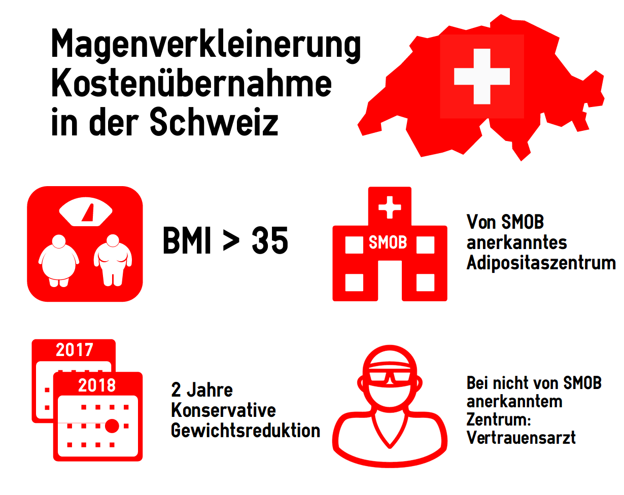 Eine Magenverkleinerung Infografik, Voraussetzungen für Kostenübernahme durch die Krankenkassen in der Schweiz. Stellt die Situtation nach Verordnung des EDI über Leistungen in der obligatorischen Krankenpflegeversicherung, Anhang 1, Allgemeinchirurgie 1.1, Stand 1.1.2014 dar.